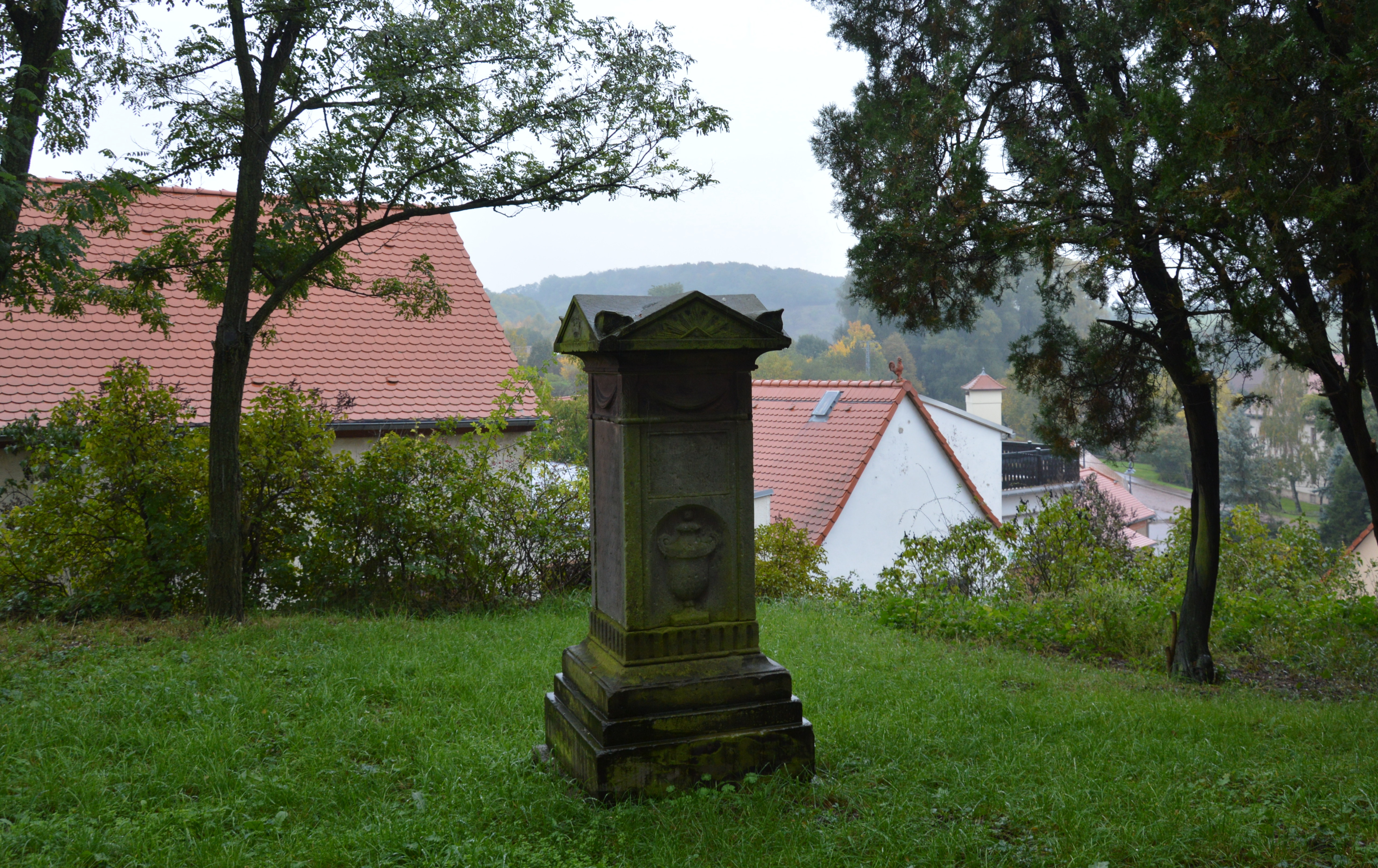 Grabmal Kirchhof Dobis